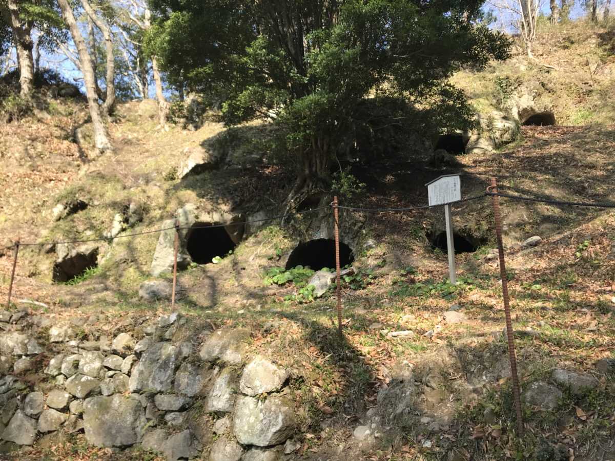 江浦横穴群